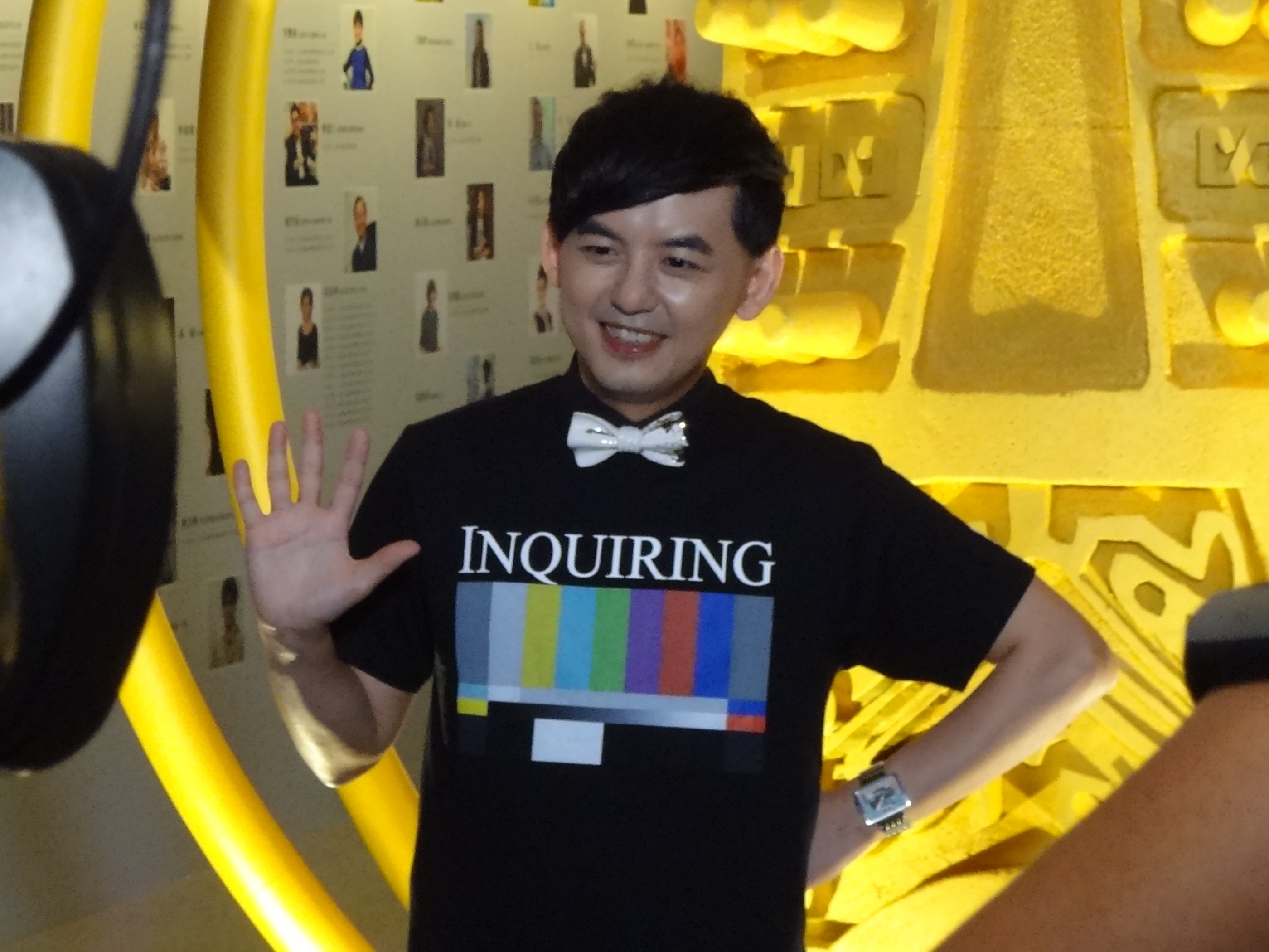 藝人黃子佼擔任松山文化創意園區「金鐘五十．響」特別展開幕記者會導覽嘉賓。